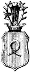 Herb Nałęcz z Heraldyki rosyjskiej Aleksandra Łakiera